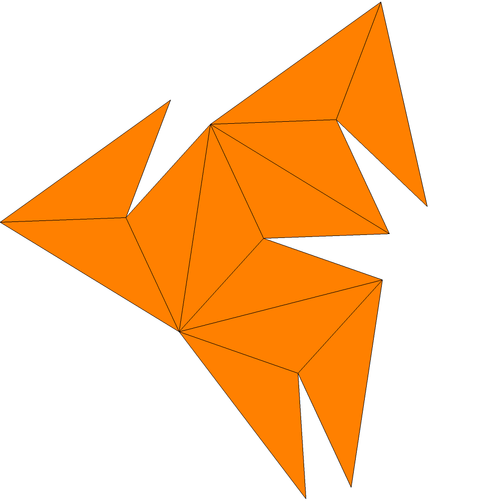 Triakistetrahedron_net